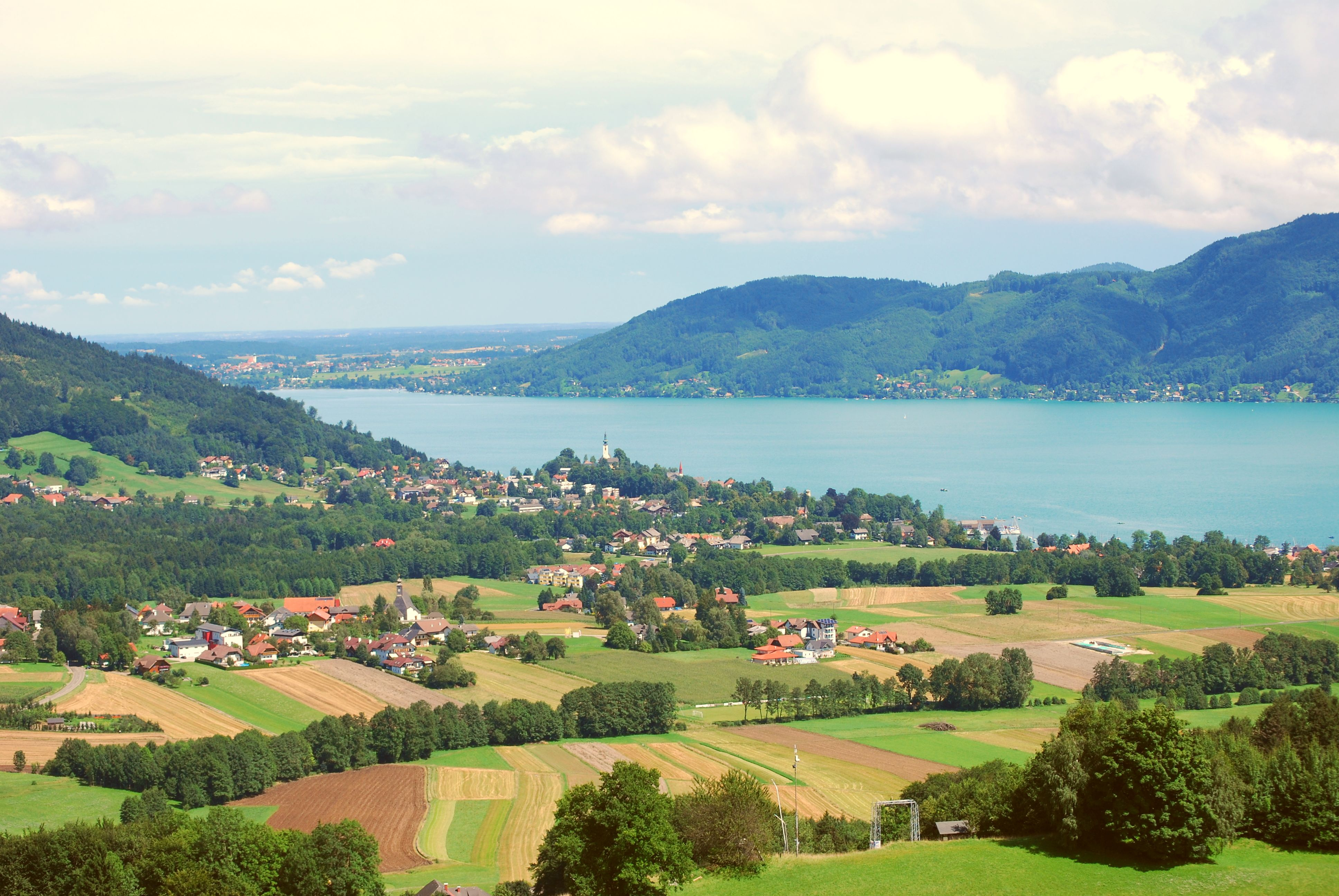 Überblick über die Gemeinde Attersee von der Kronbergerkapelle aus